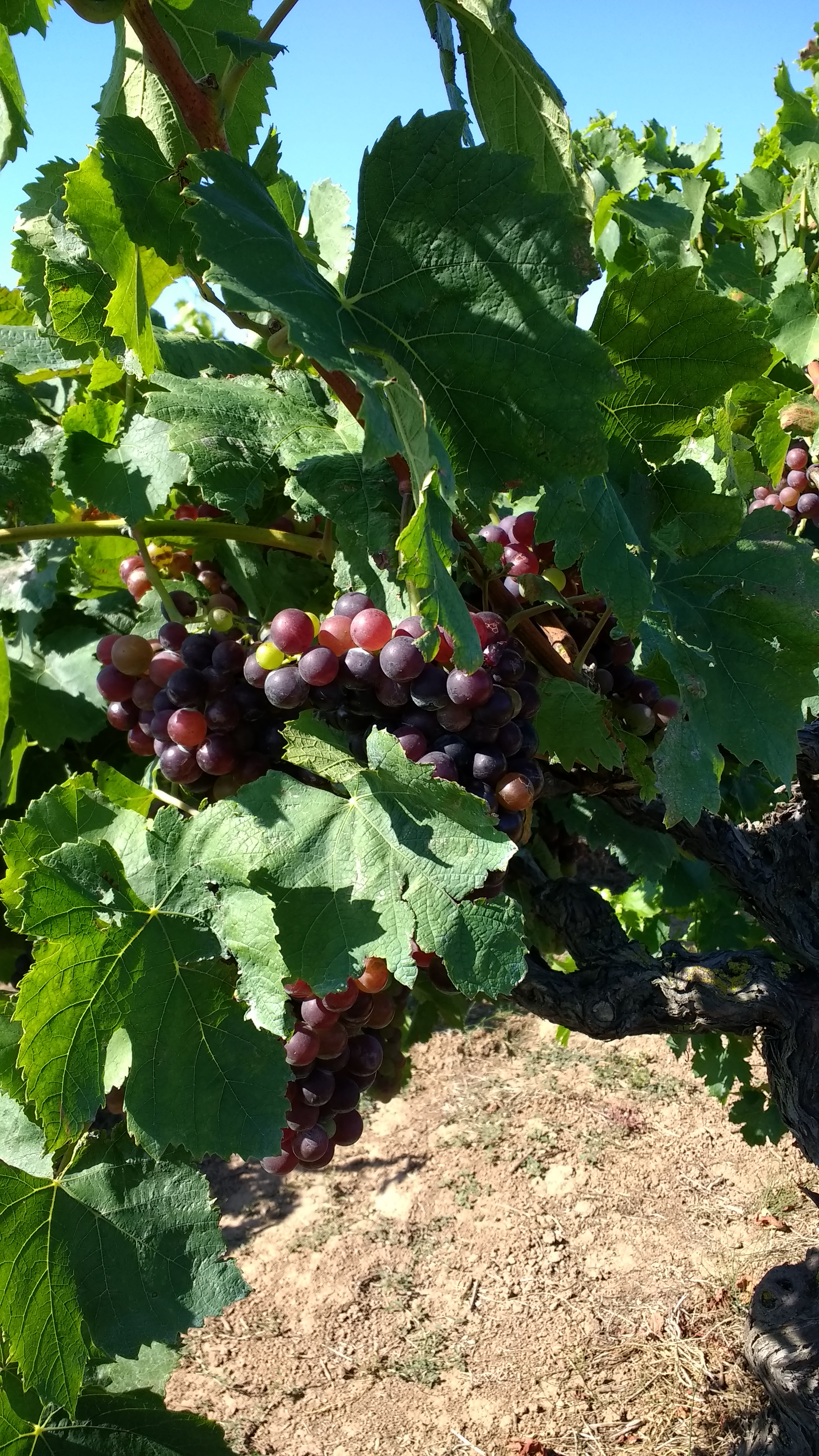 Cépage Aramon à Bessan dans l'Hérault après le début de la veraison